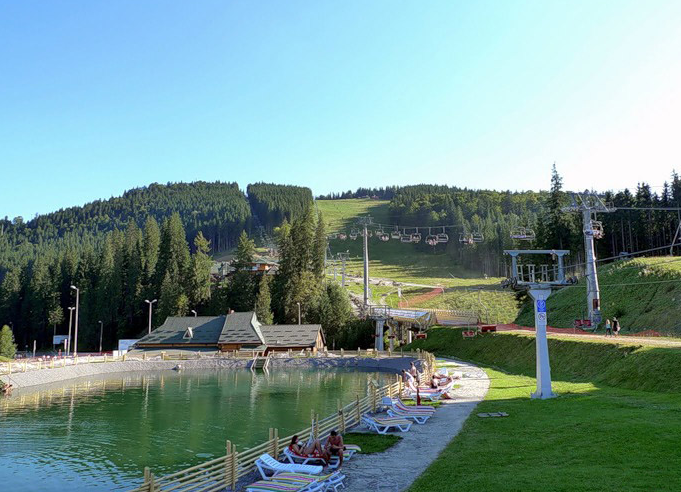 Малое озеро горнолыжного и спа курорта Буковель